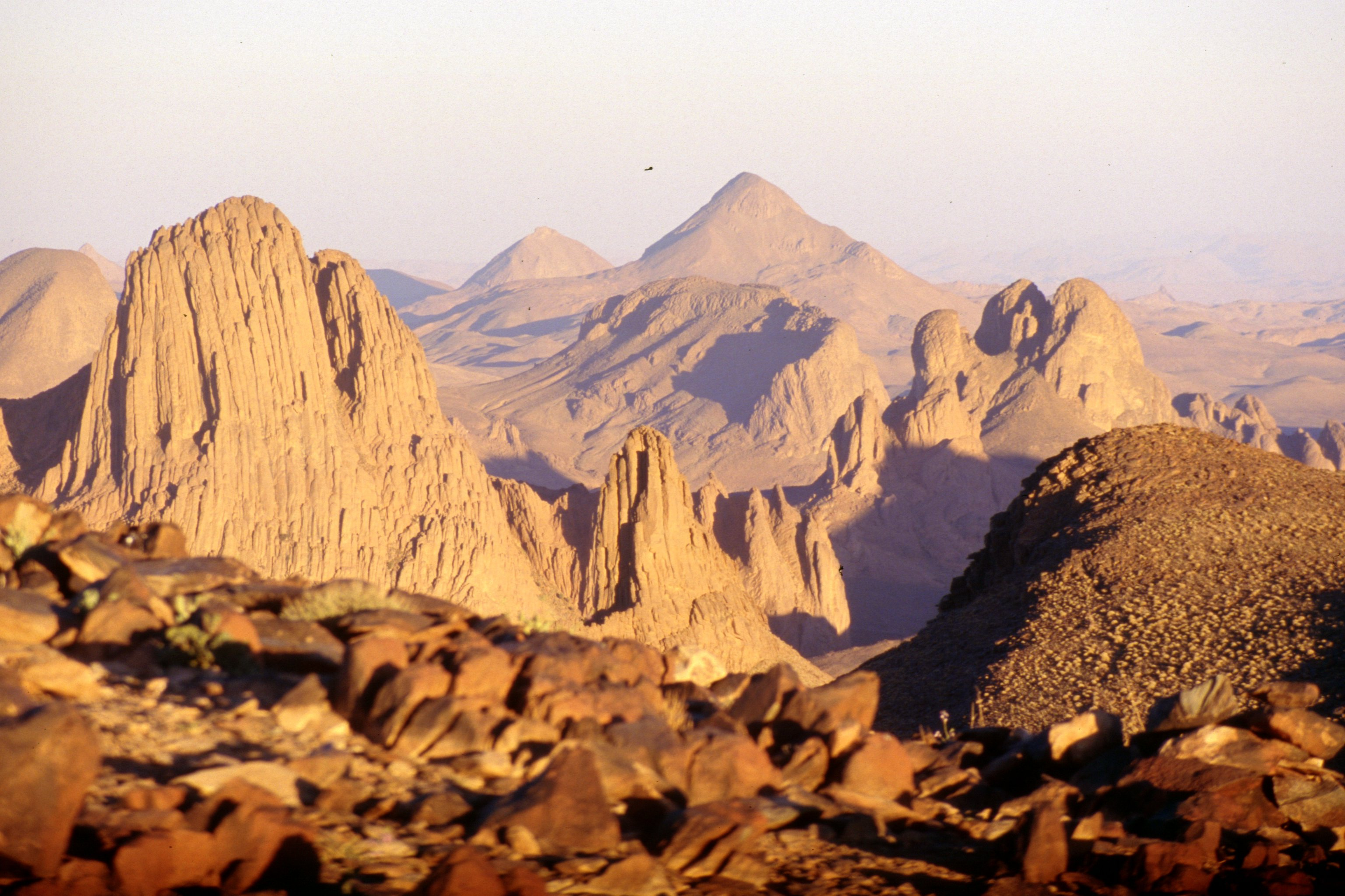 Région de l'Asskrem dans le Hoggar (wilaya de Tamanrasset, sud de l'Algérie).